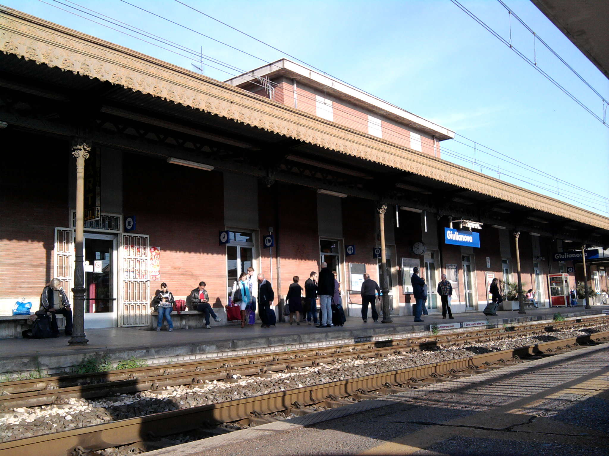 Stazione di Giulianova vista dai binari